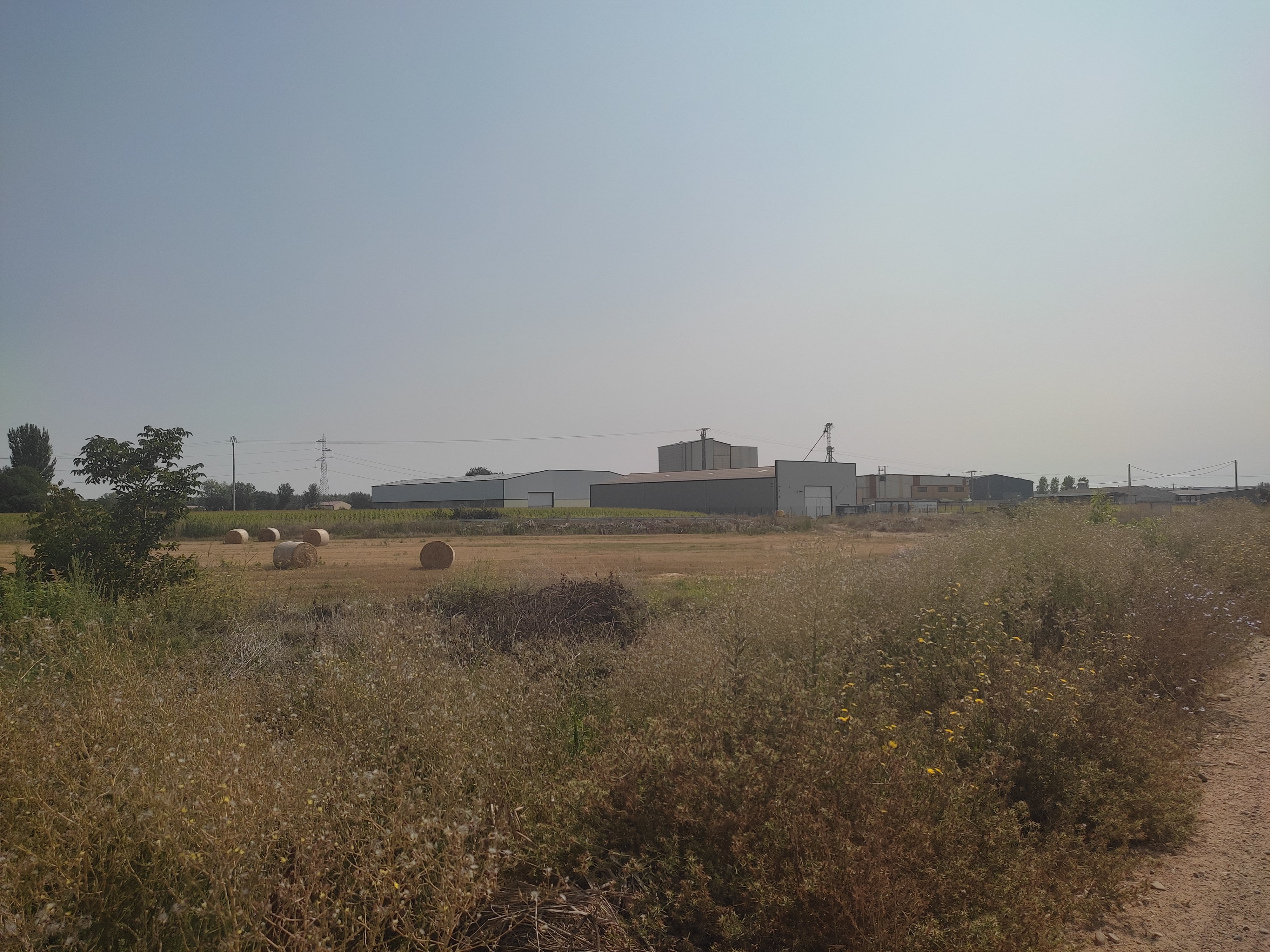 Naves industriales rodeadas de campos de cultivo en Villademor de la Vega, León, Castilla y León, España.